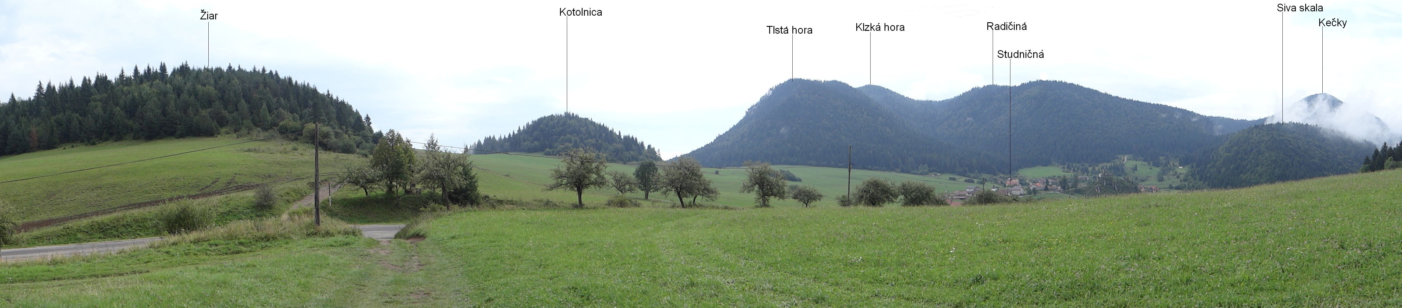 Studničná, część wsi Komjatná. Panorama widokowa z przełęczy nad Studničną